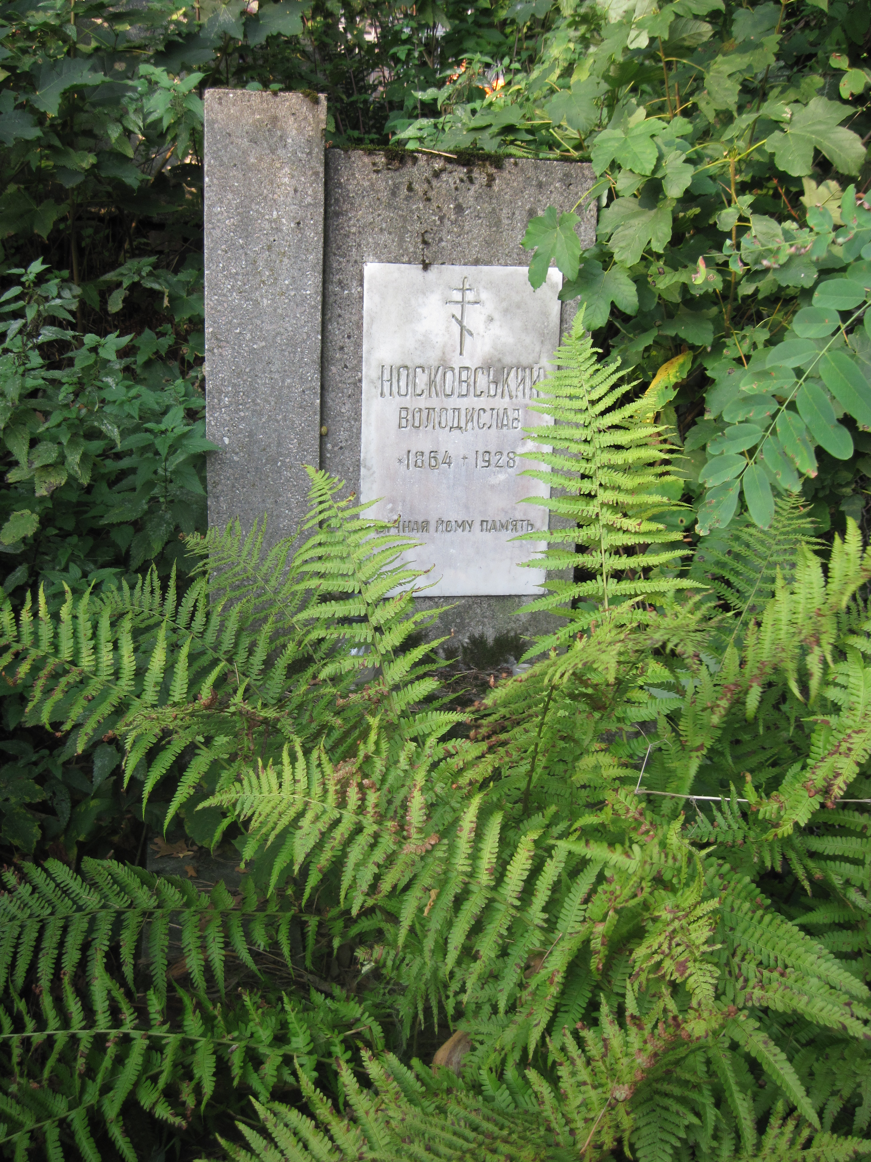 Надгробок о. Володислава Носковського